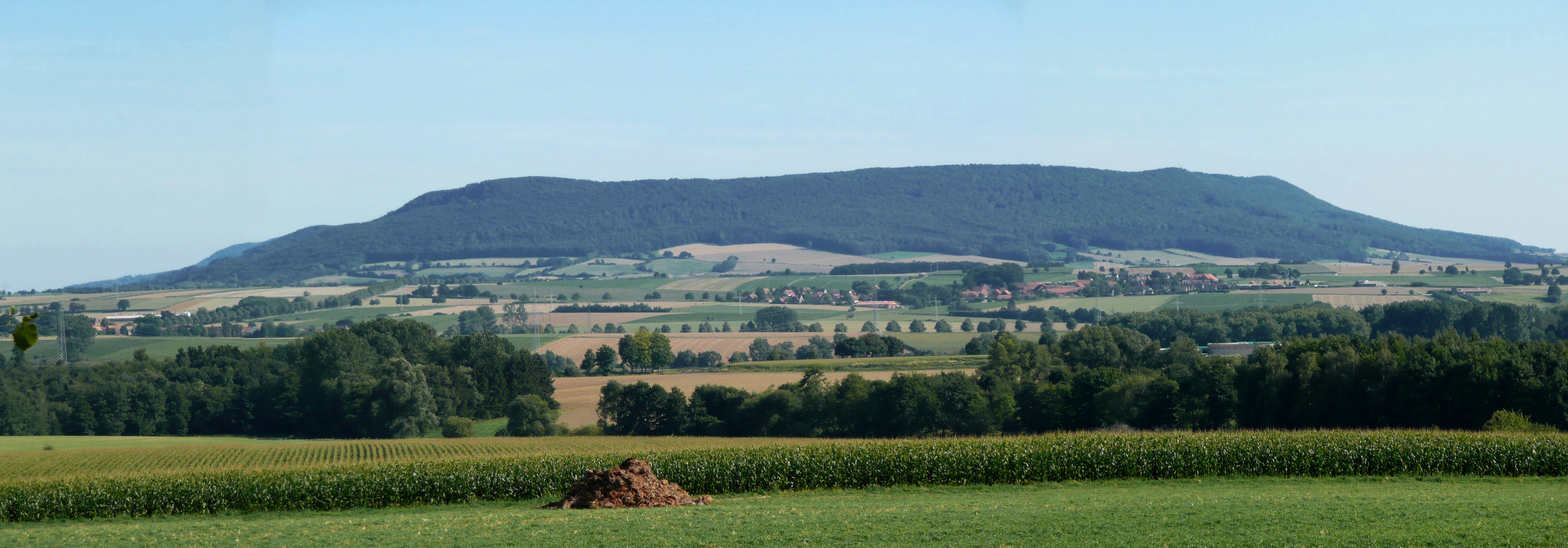 Ith aus Nordwesten von Kleinen Süntel gesehen